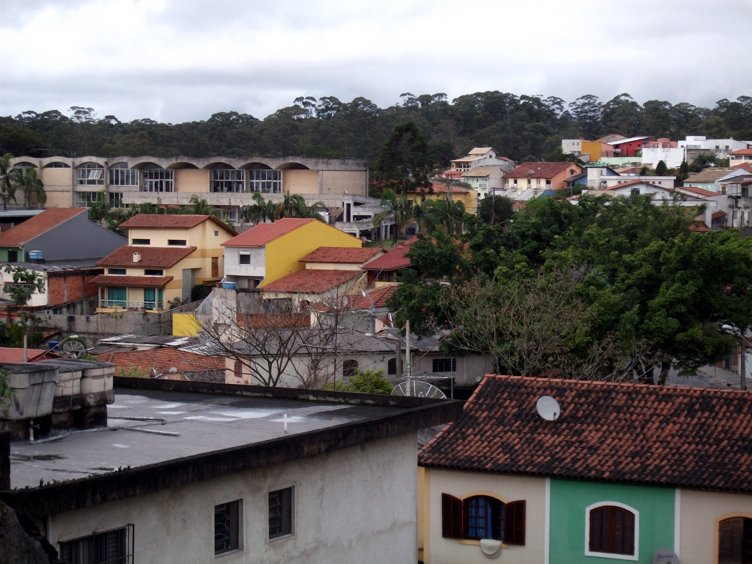 Foto do Bairro Jardim Nossa Senhora do Carmo nos arredores do Parque do Carmo.